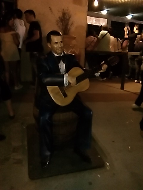 Estatua en homenaje al recordado cantante folklórico Hernán Figueroa Reyes, ubicada al lado de una de las puertas de ingreso al anfiteatro.